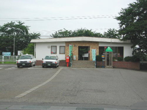 JR田上駅